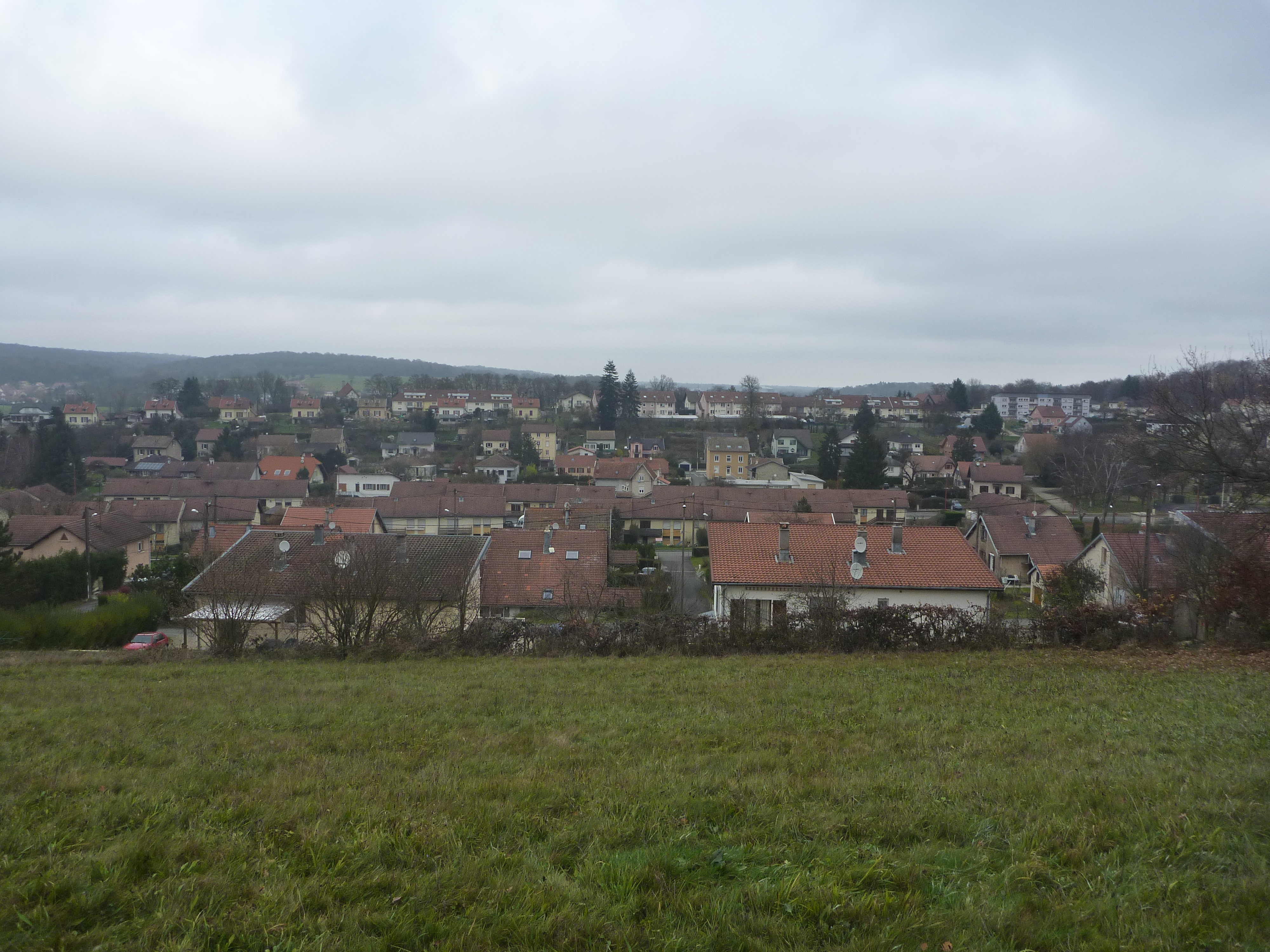 Photo offrant une vue partielle du village français de Fesche-le-Châtel